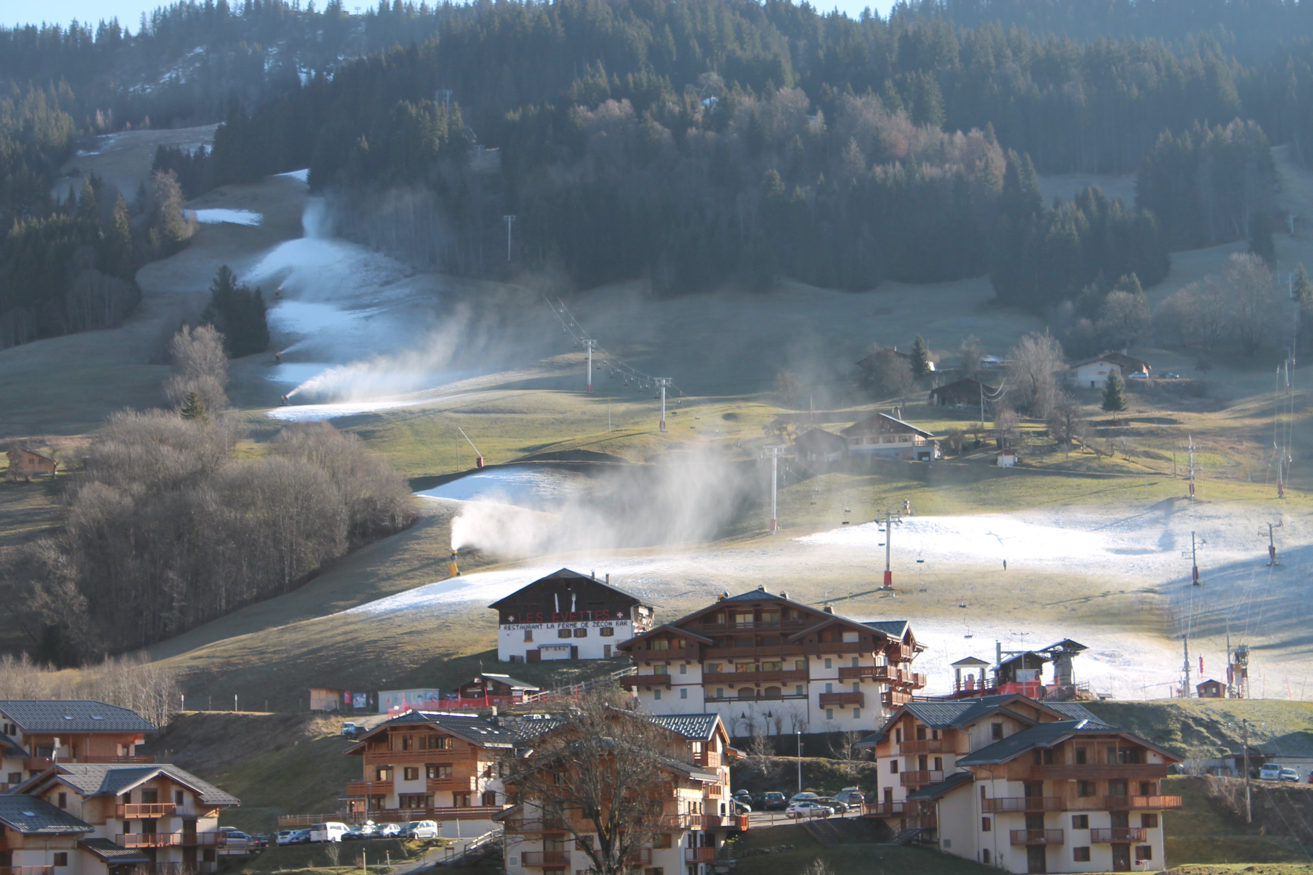 Enneigement artificiel des pistes. Hameau touristique Les Evettes de Flumet (Savoie)